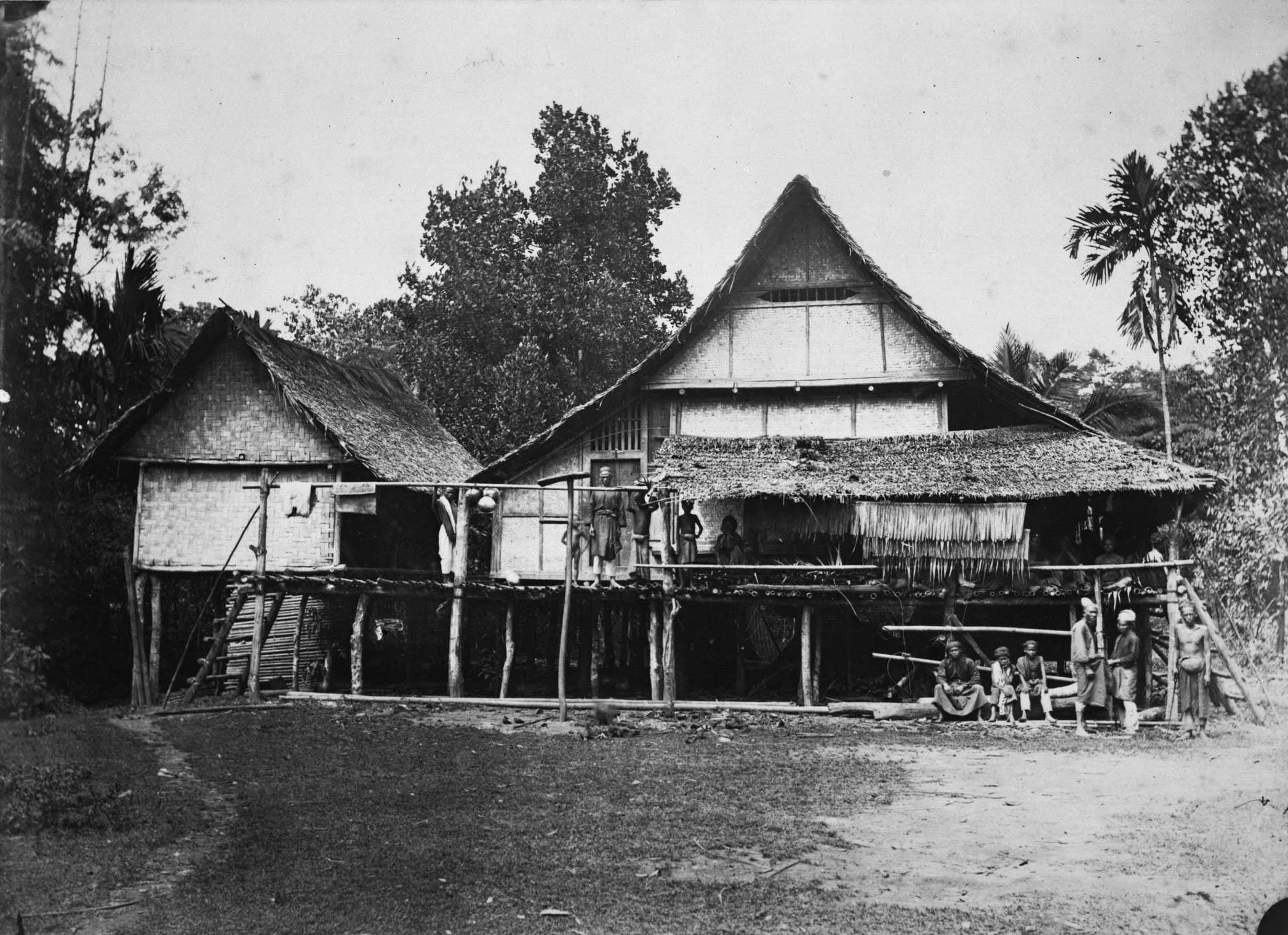 Foto. Maleische woning in Deli(Sumatra's oostkust)à 1870